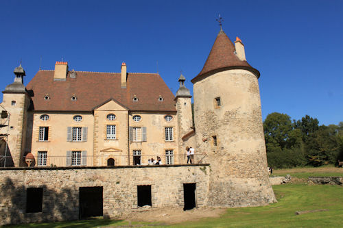 Meillard (03) Château des Aix